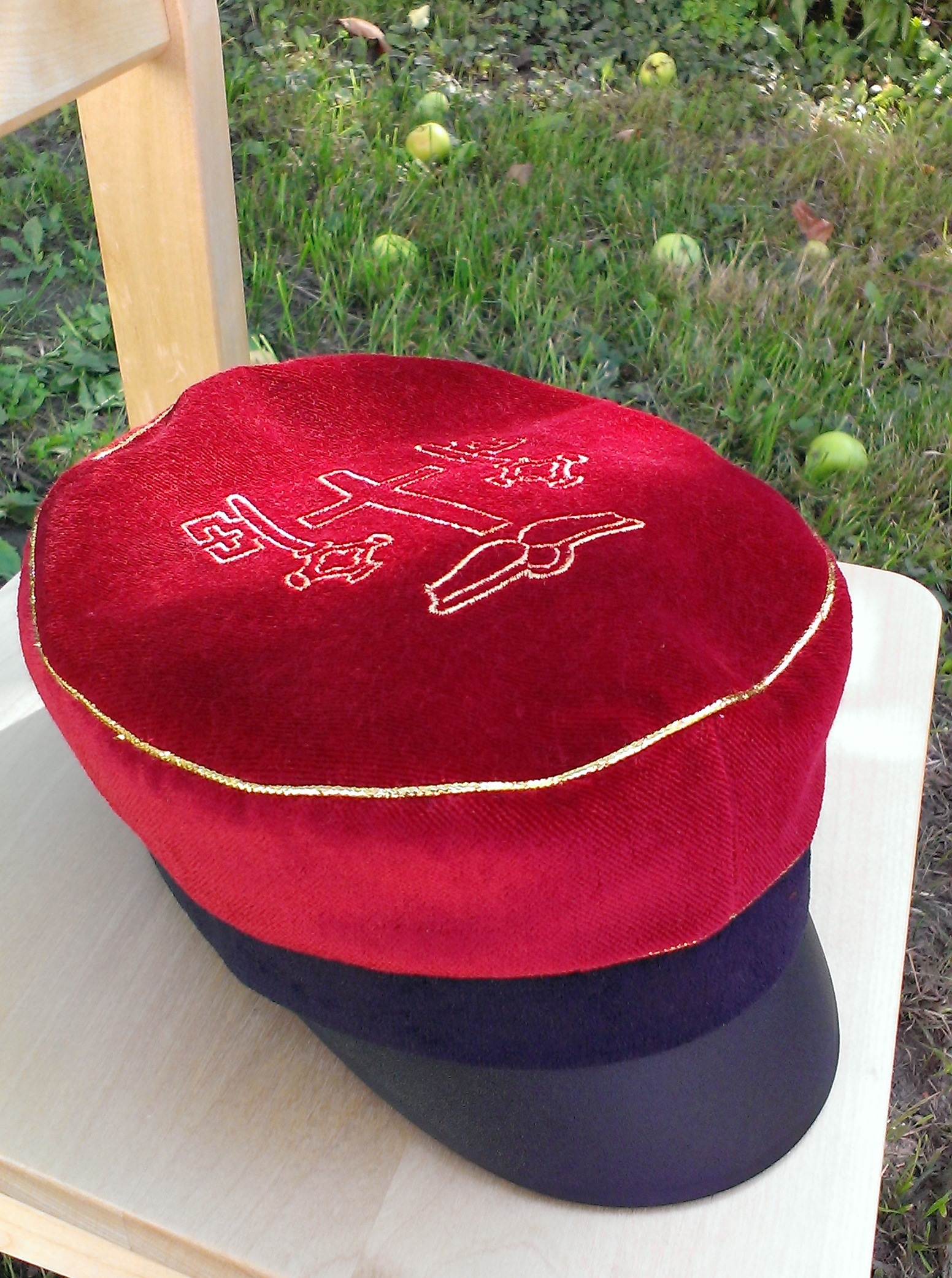 Tartu Luterliku Peetri Kooli koolimüts